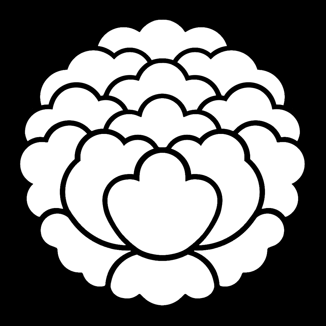 「大割牡丹」紋（染抜）